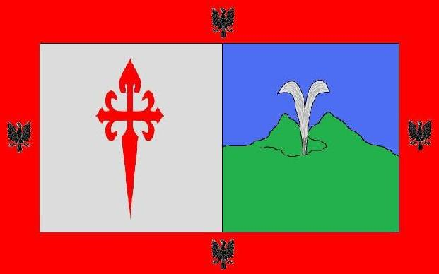 Bandera Valdefuentes